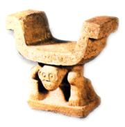 Silla de la Cultura Huancavilca